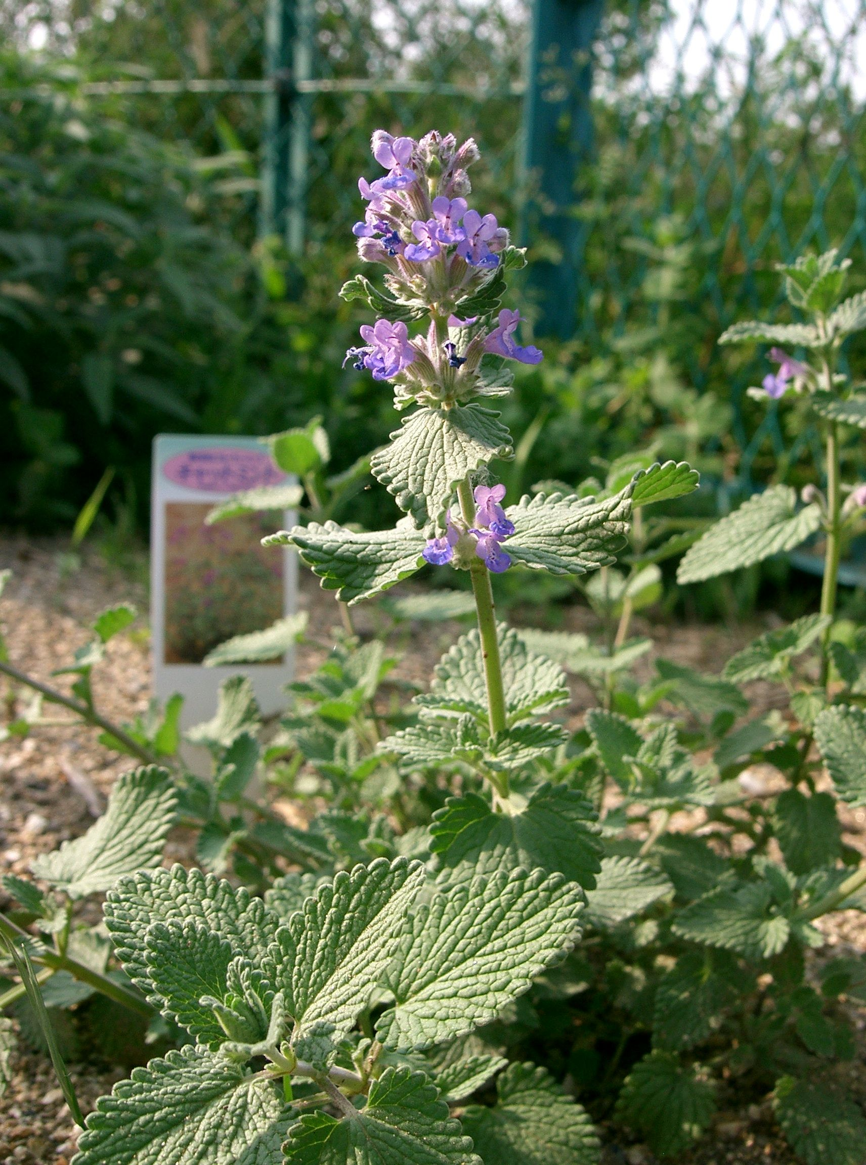 Nepeta faassenii